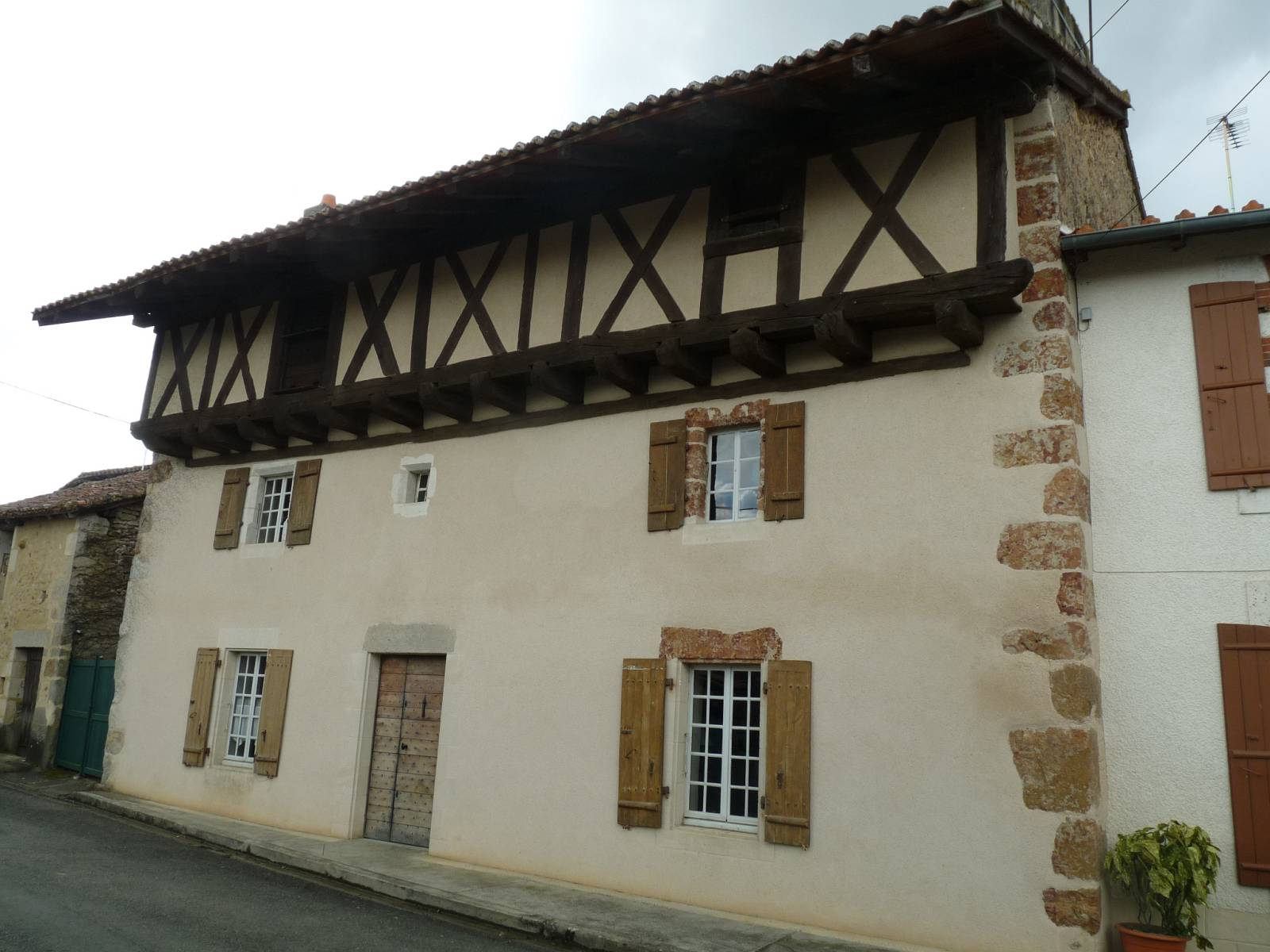 maison à colombages à Chantrezac, Charente, France